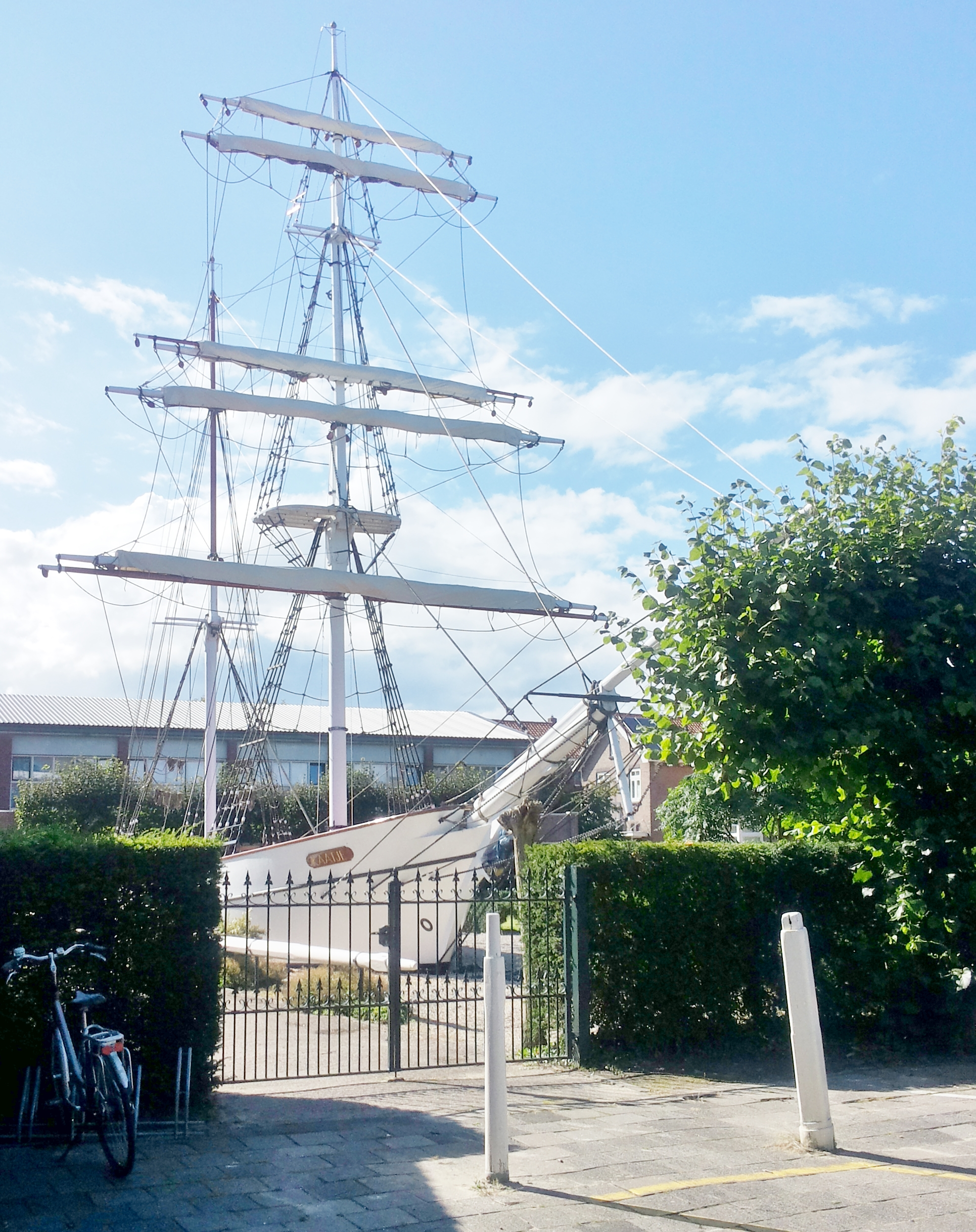 Die "Kaatje", Ausbildungsschiff, Enkhuizer Zeevaartschool